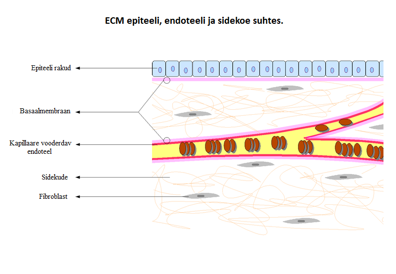 Illustratsioon, mis kujutab ekstratsellulaarset maatriksit epiteeli, endoteeli ja sidekoe suhtes.